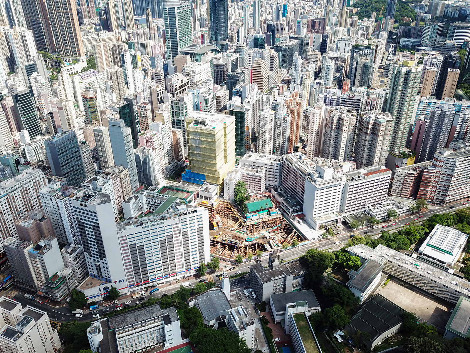 Kwong Wah Hospital